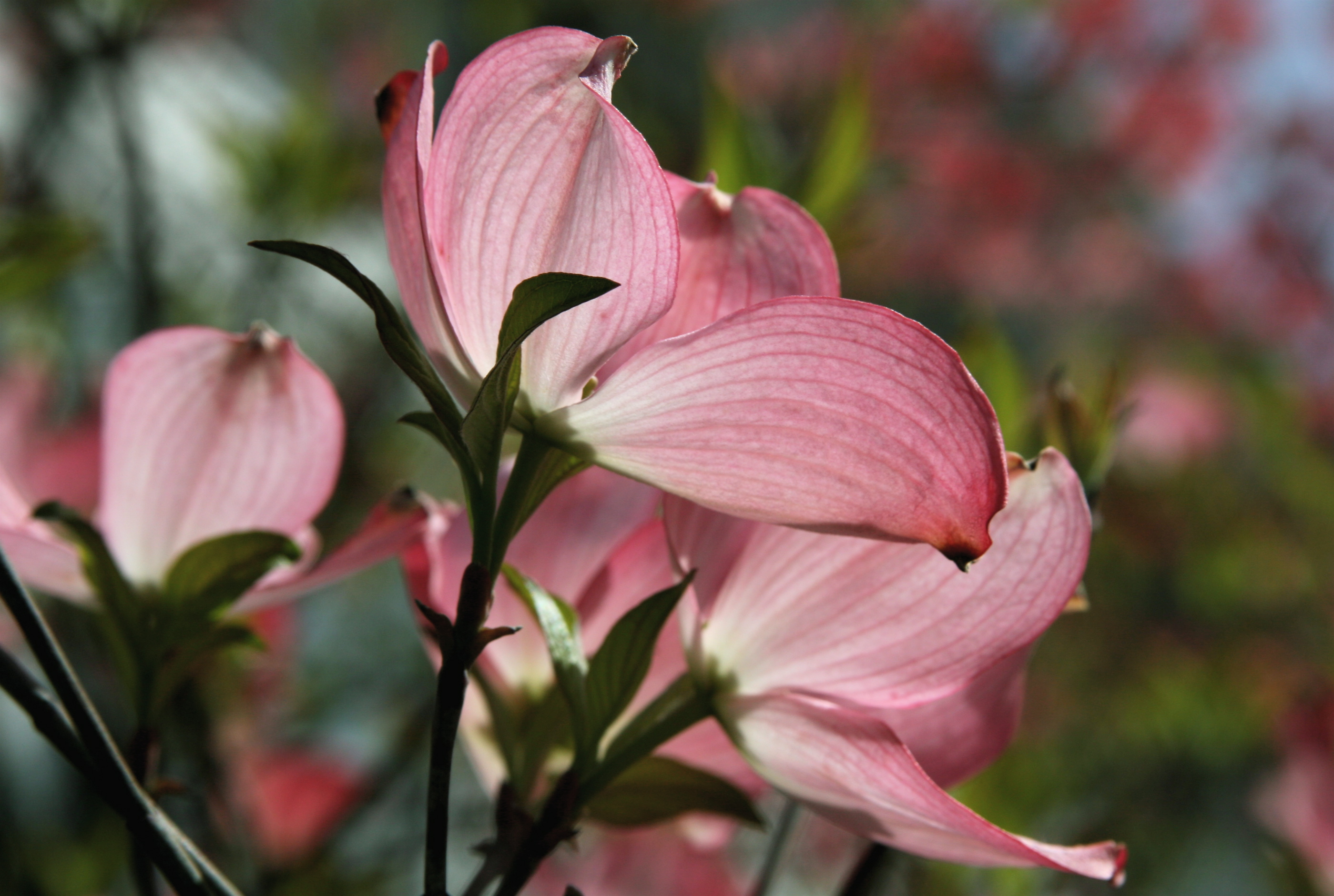 backlit dogwood